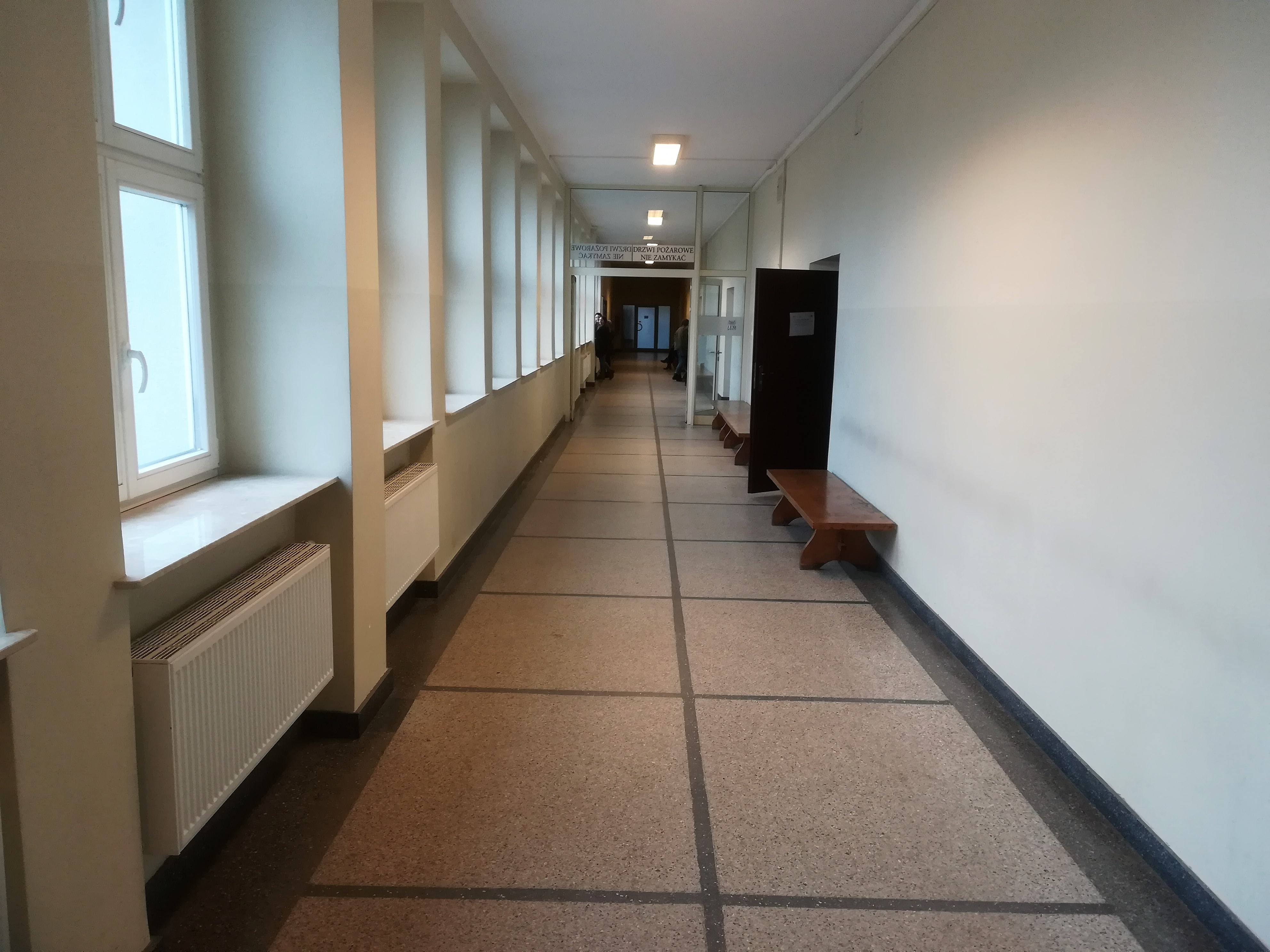 Wydział Nauk Społecznych - UAM Poznań, korytarz.